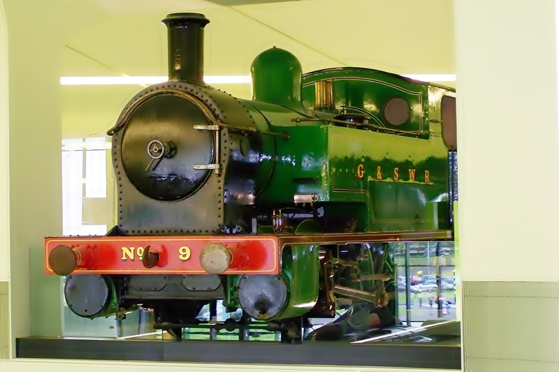 loco002